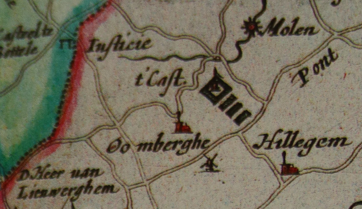 Oombergen, Atlas Maior, Joan Blaeu, 1665. 't' Cast.' (Kasteel van Oombergen), windmolen van Oombergen.